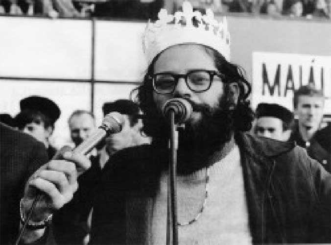 Allen Ginsberg incoronato "Re di Maggio" nel suo discorso.